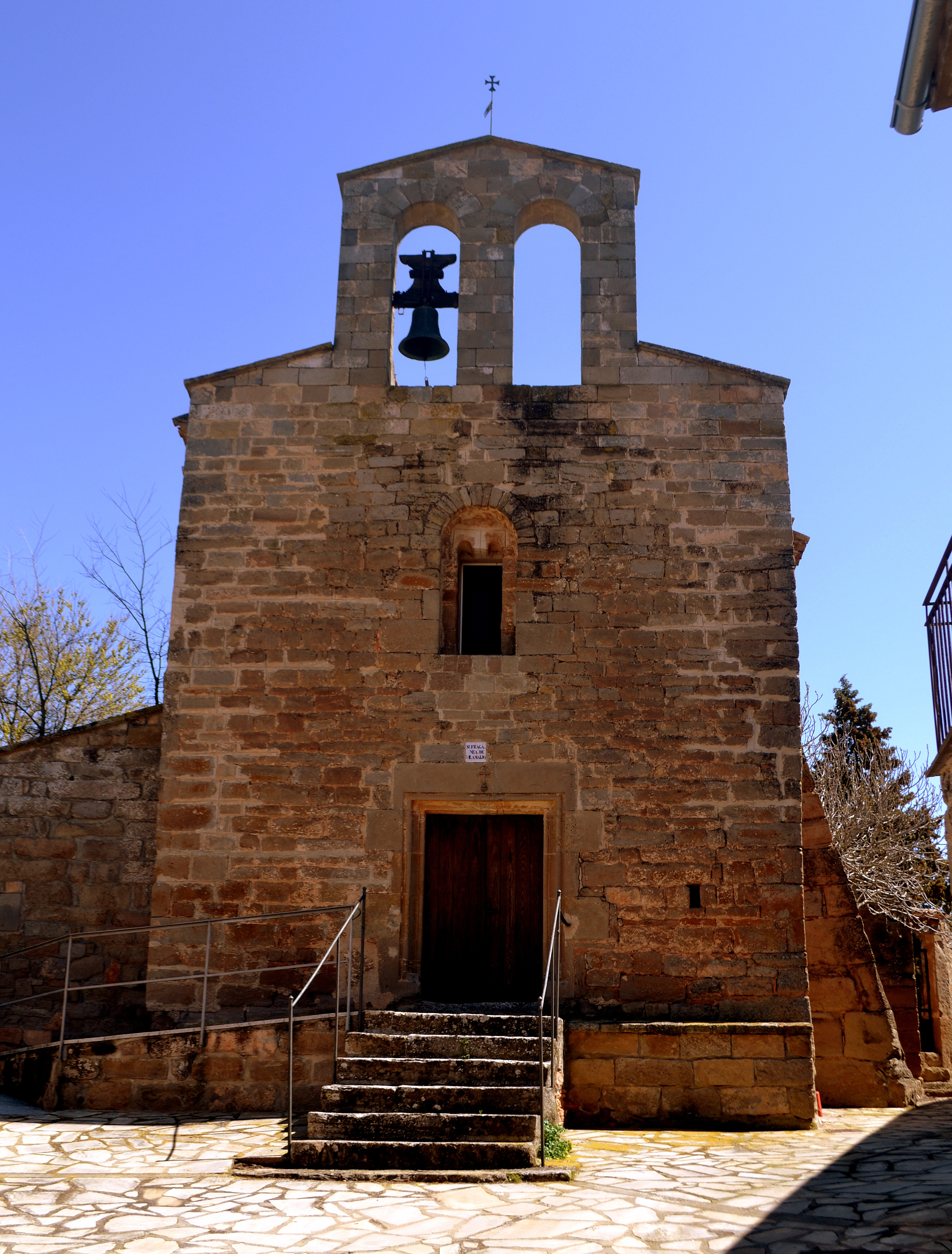 Església parroquial de Santa Maria de Vilamajor (Cabanabona)